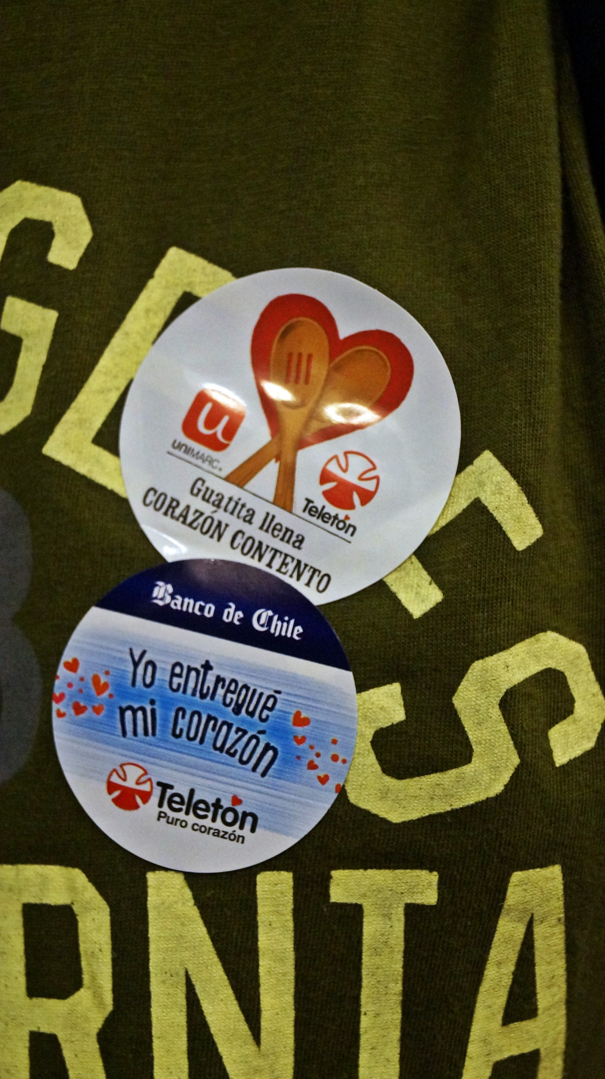 Stickers de la Teletón 2012 (Unimarc y depósito en el Banco de Chile)